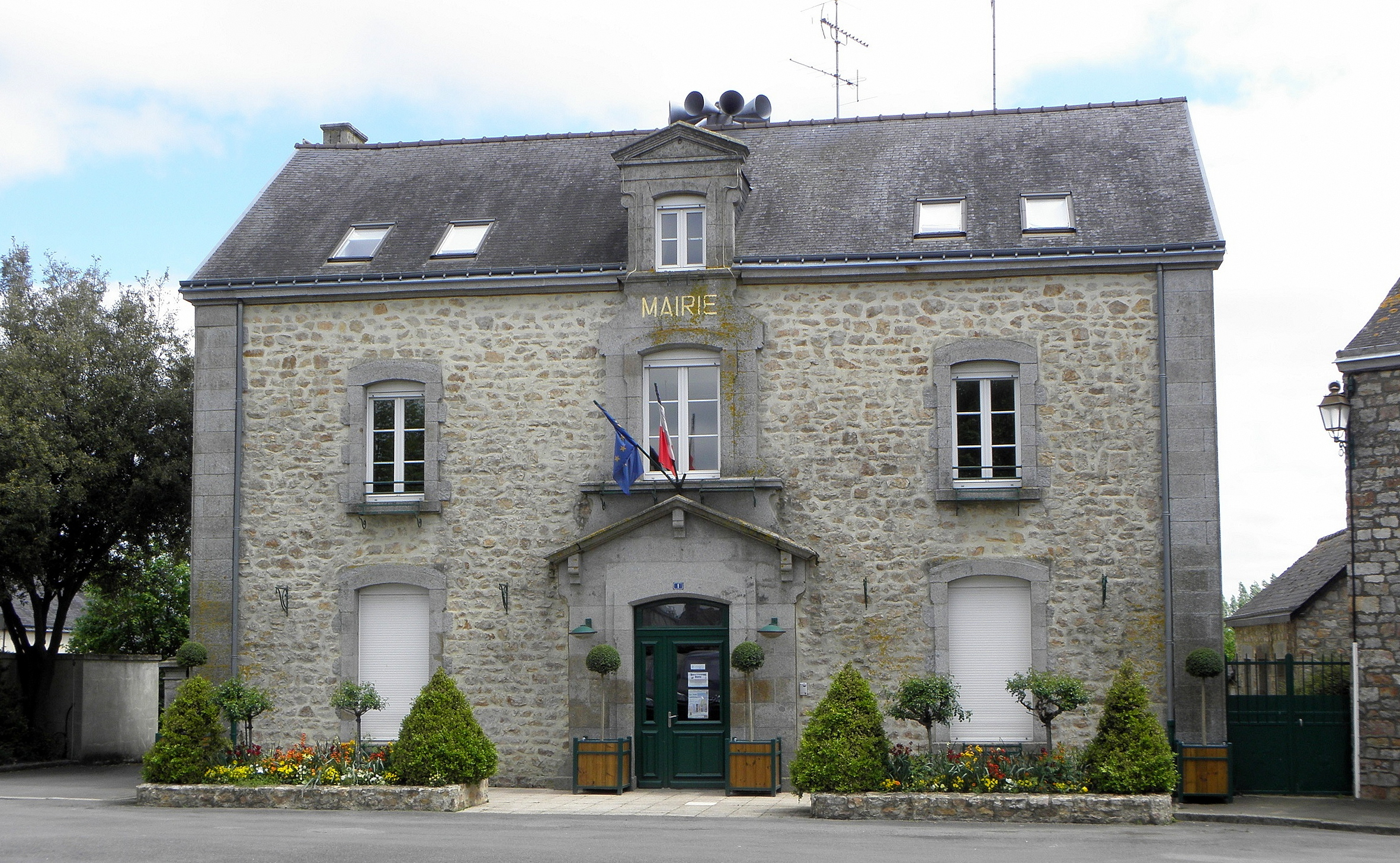 Mairie de Juvigné (53).